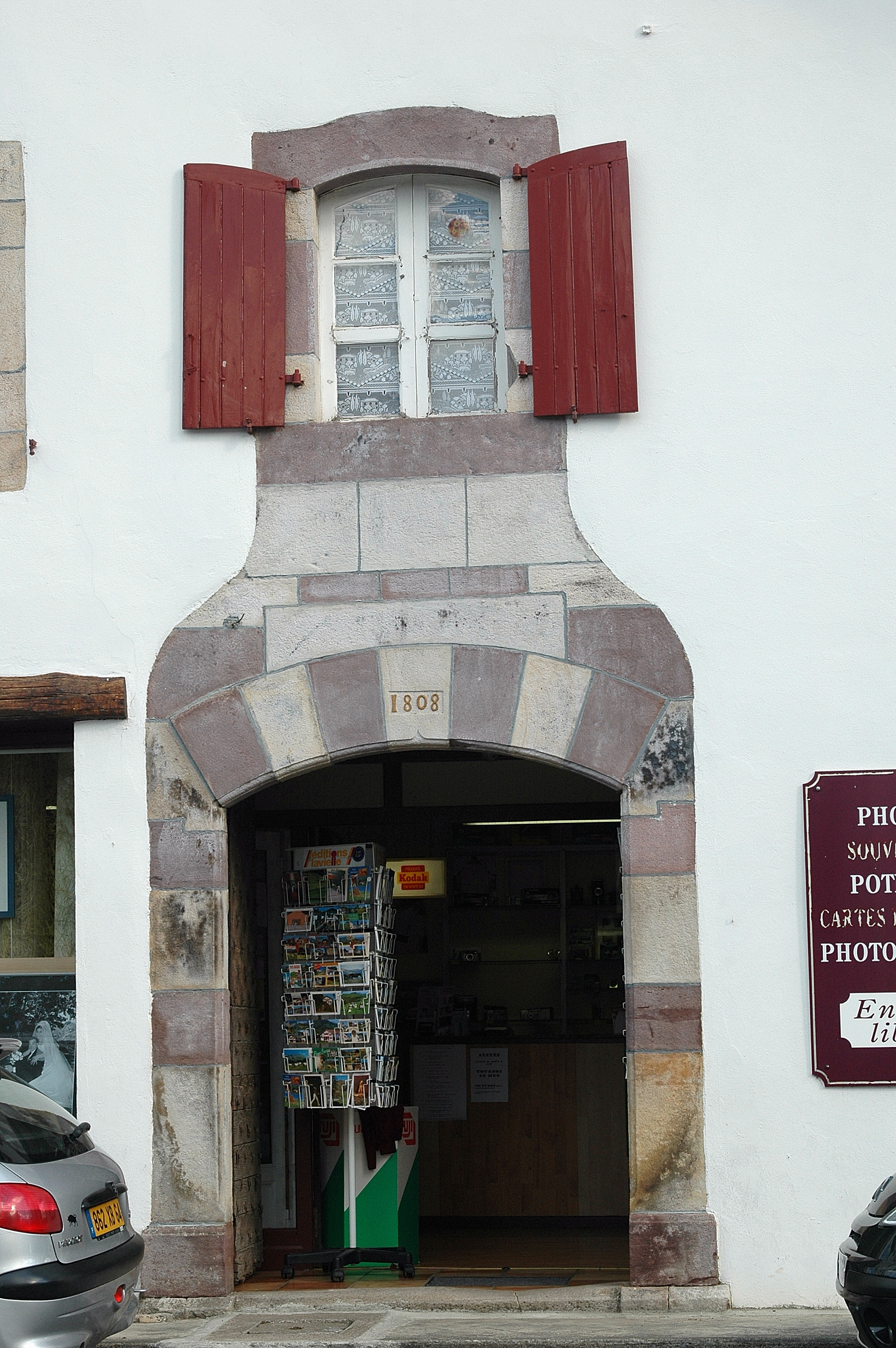 Saint-Étienne-de-Baïgorry, porte "bouteille". Photo prise le 03/08/06 par Harrieta171